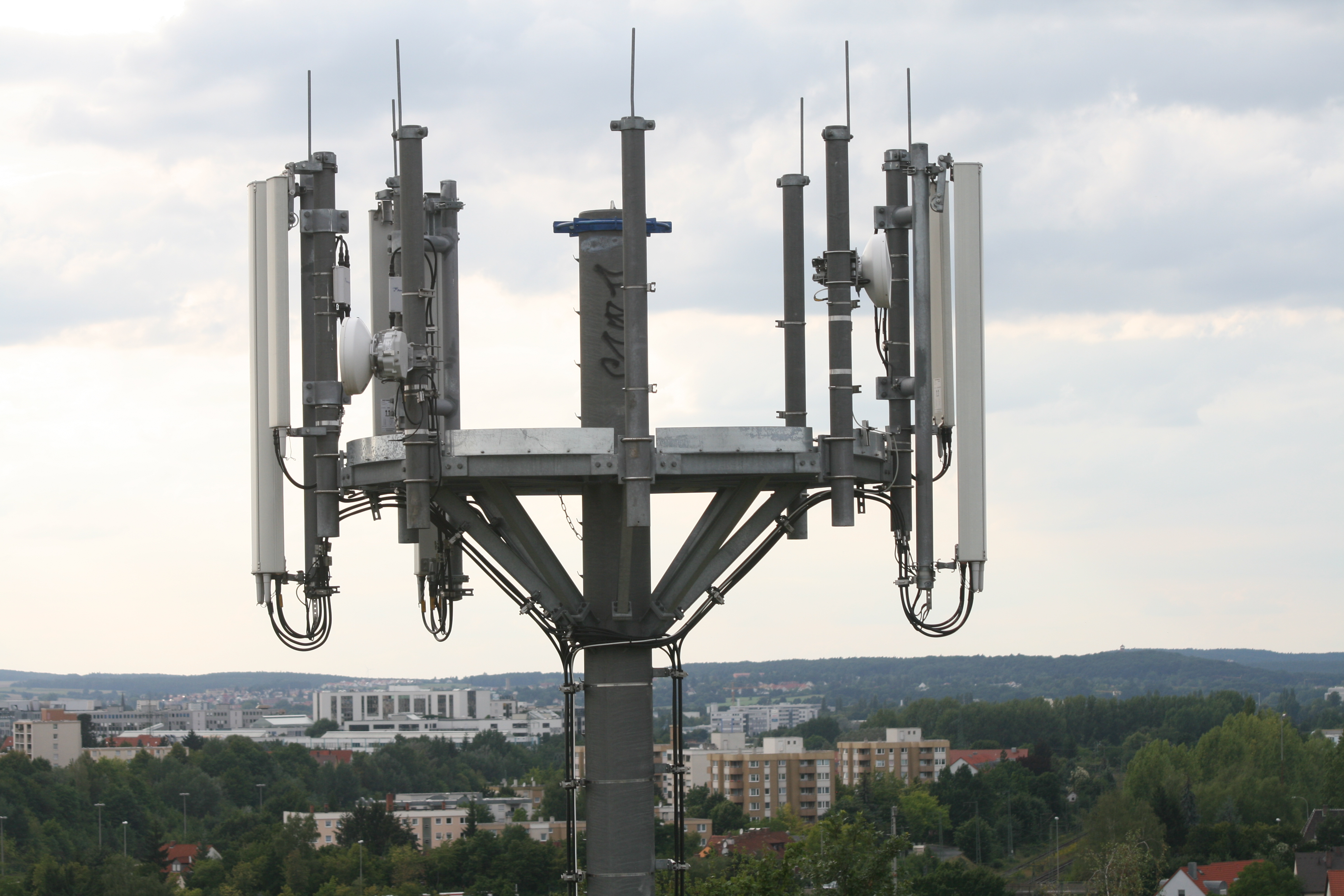 Mobilfunkantennenanlage